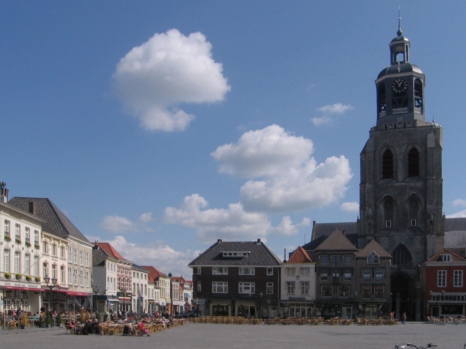 Bergen op Zoom, 17 april 2006